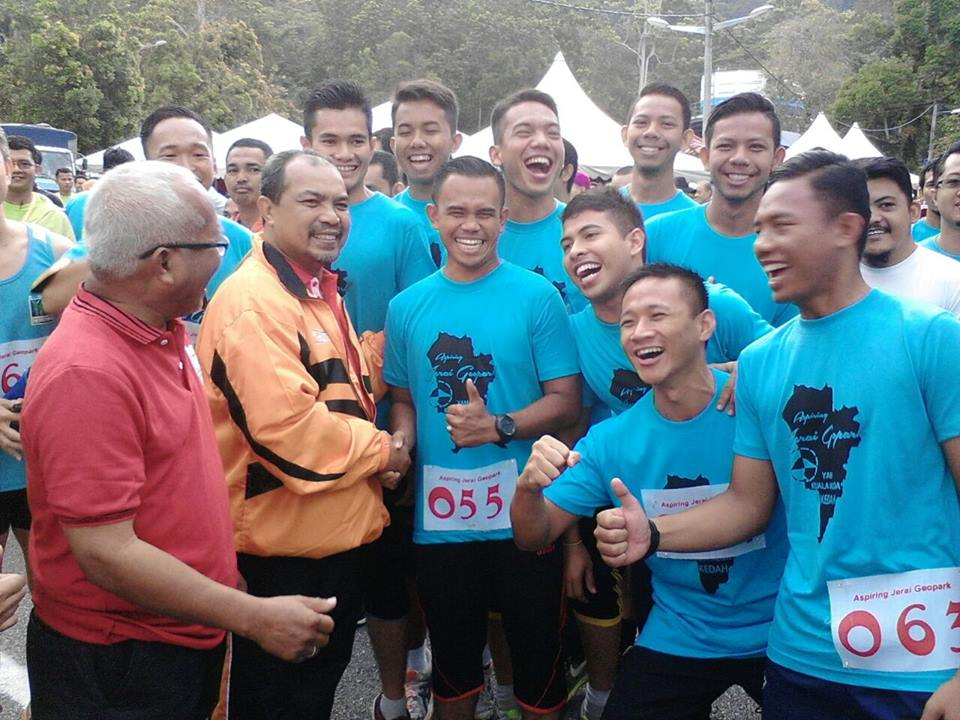 Larian Aspiring Jerai Geopark 2016